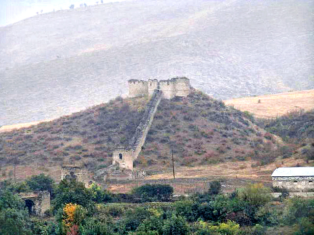 Azərbaycanda, Qarabağ bölgəsində Əsgəran rayonu ərazisində Qarabağ xanı İbrahimxəlil xan tərəfindən inşa etdirilmiş Əsgəran qalası Original description by the photographer: :Mayraberd-Askeran Fortress on a misty day (Note; this version has increased contrast so the mist doesn't really show)